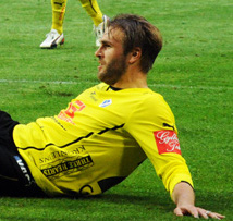 Jesper Westerberg